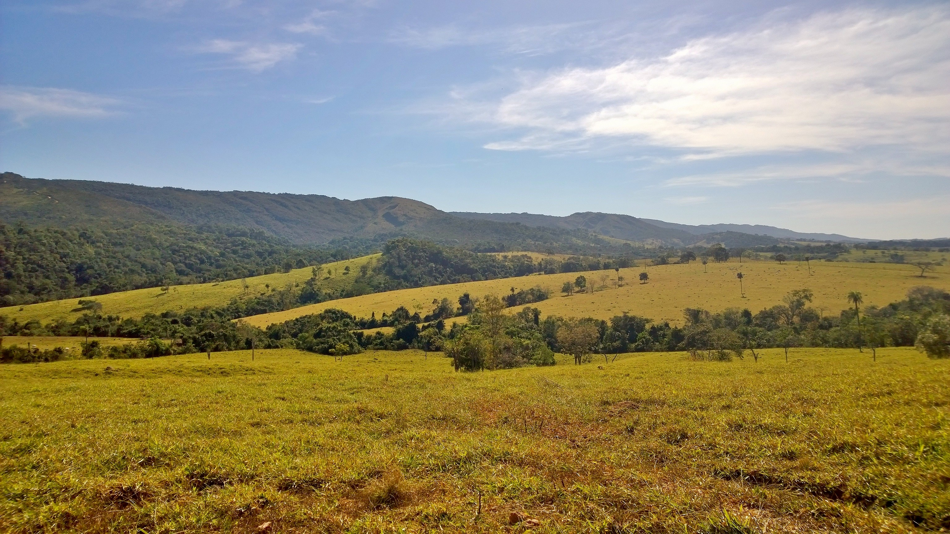 Foto mostrando uma cadeia de pequenas serras no Parque Estadual da Serra Dourada, em Goiás.